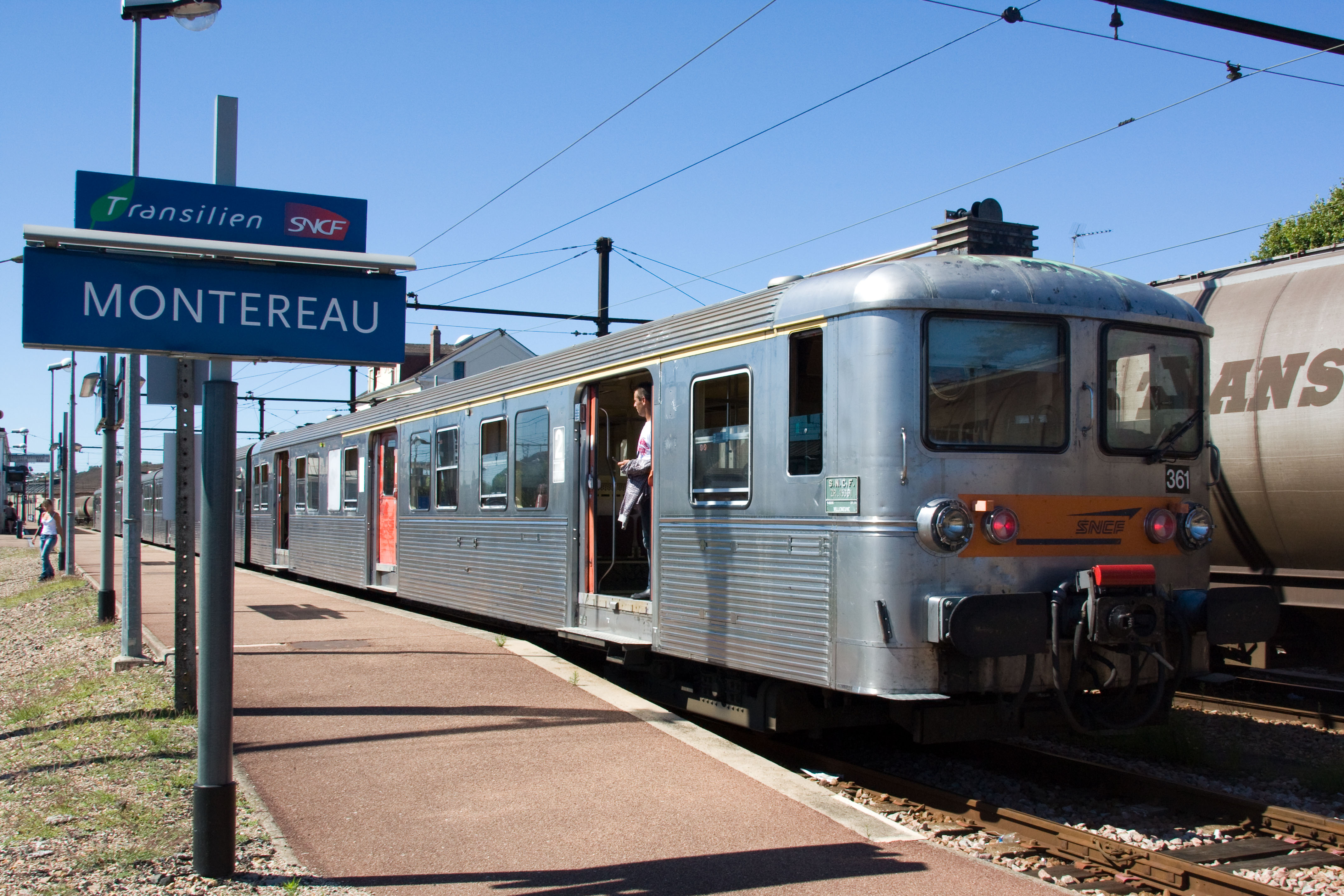 Gare de Montereau, Montereau, Seine-et-Marne, France